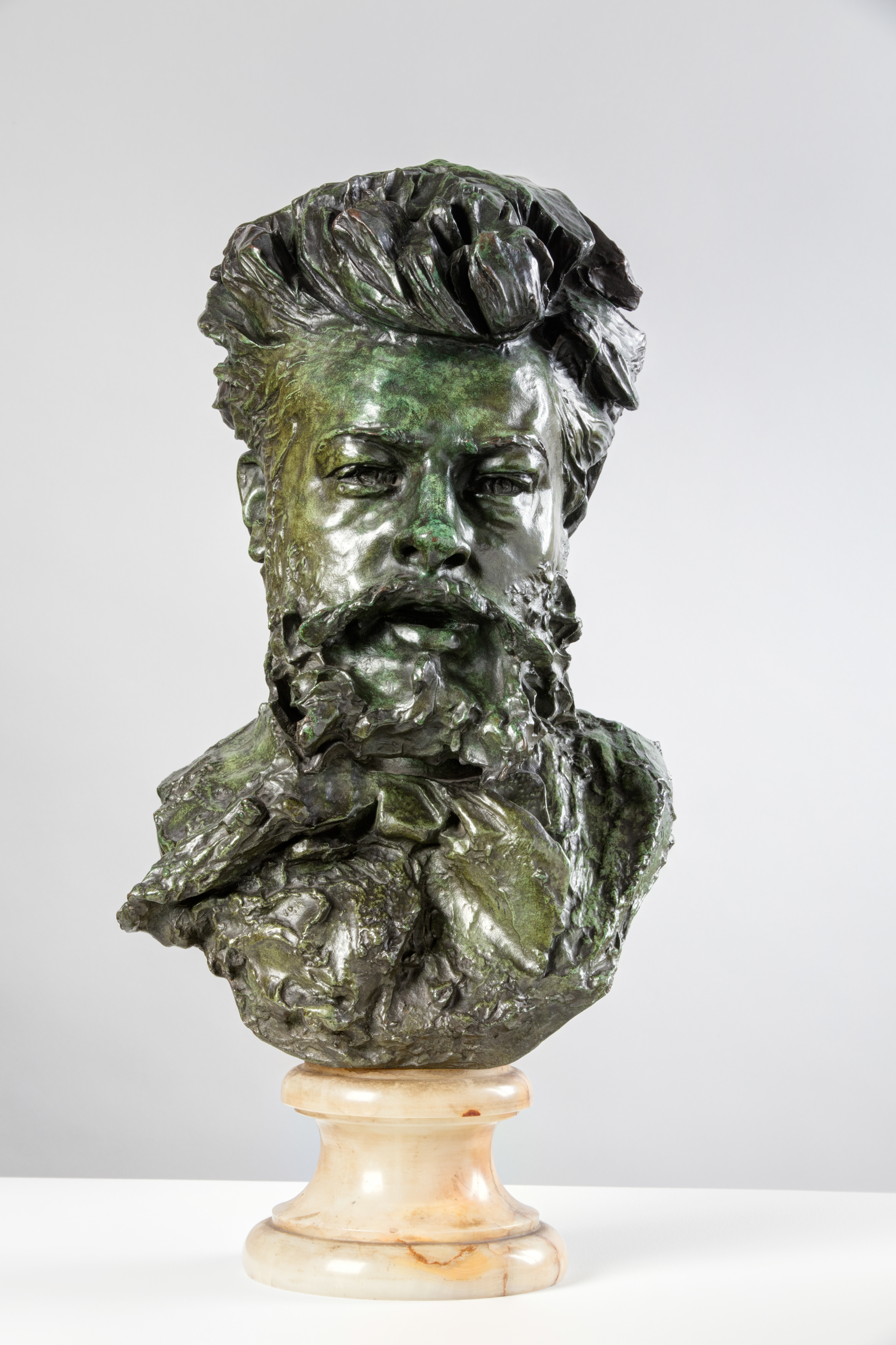 La era de Rodin Colección Museo Soumaya